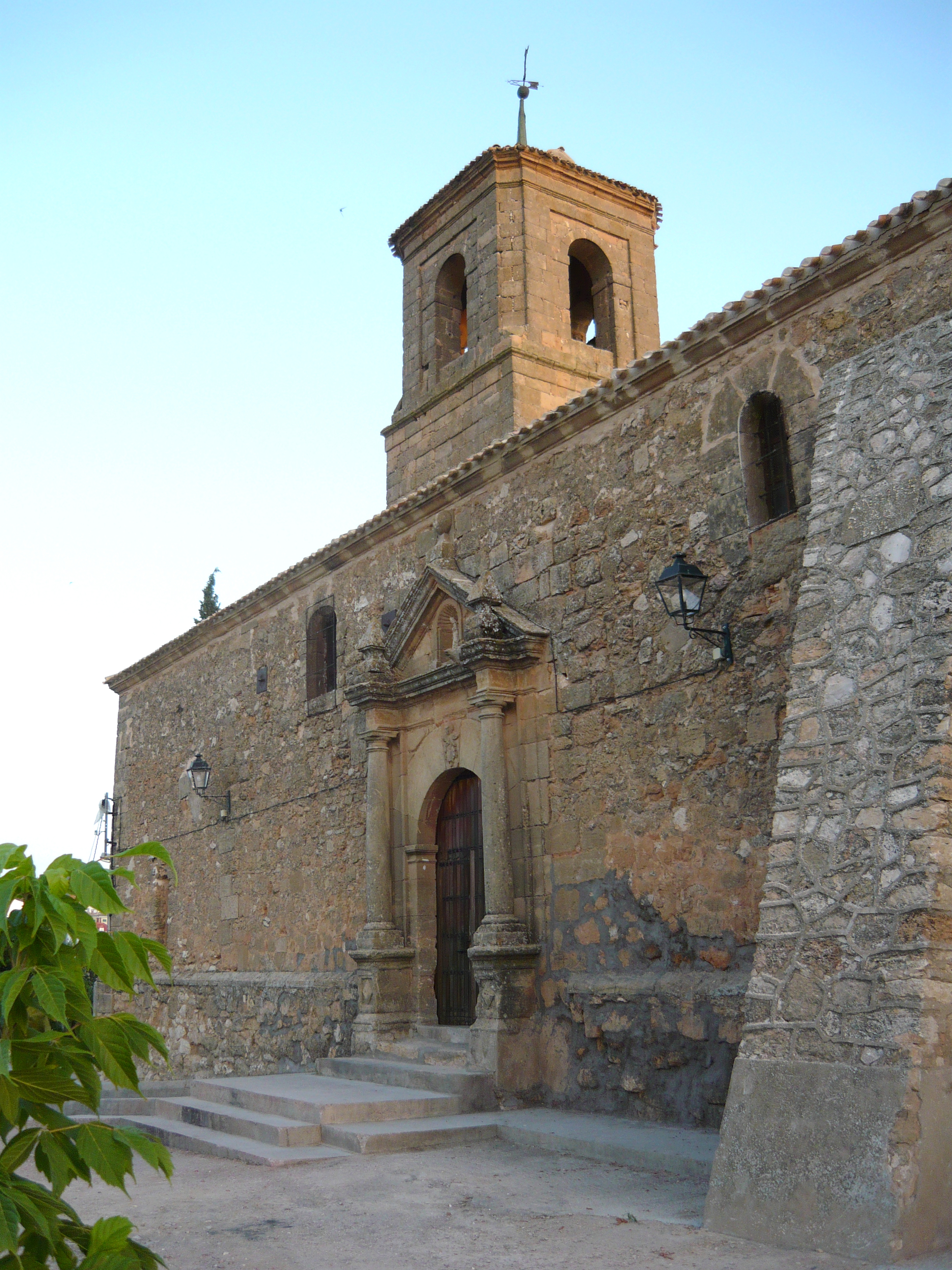 Iglesia de la Asunción, Olivares de Júcar, Cuenca, España.